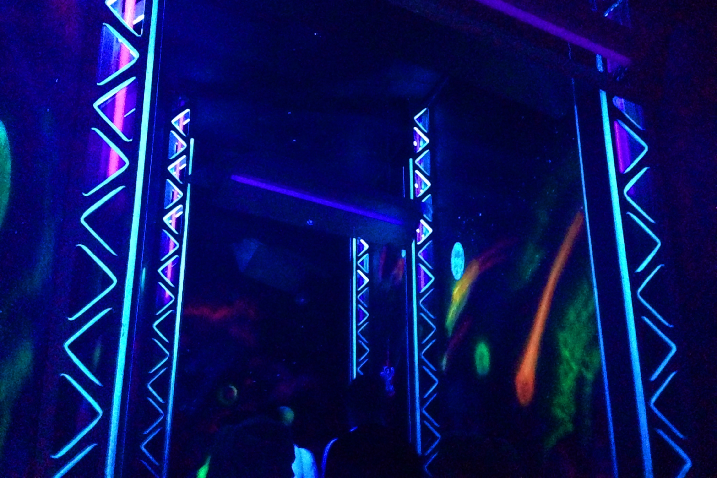 Der Wartebereich von EuroMir ist mit UV-Effekten gestaltet